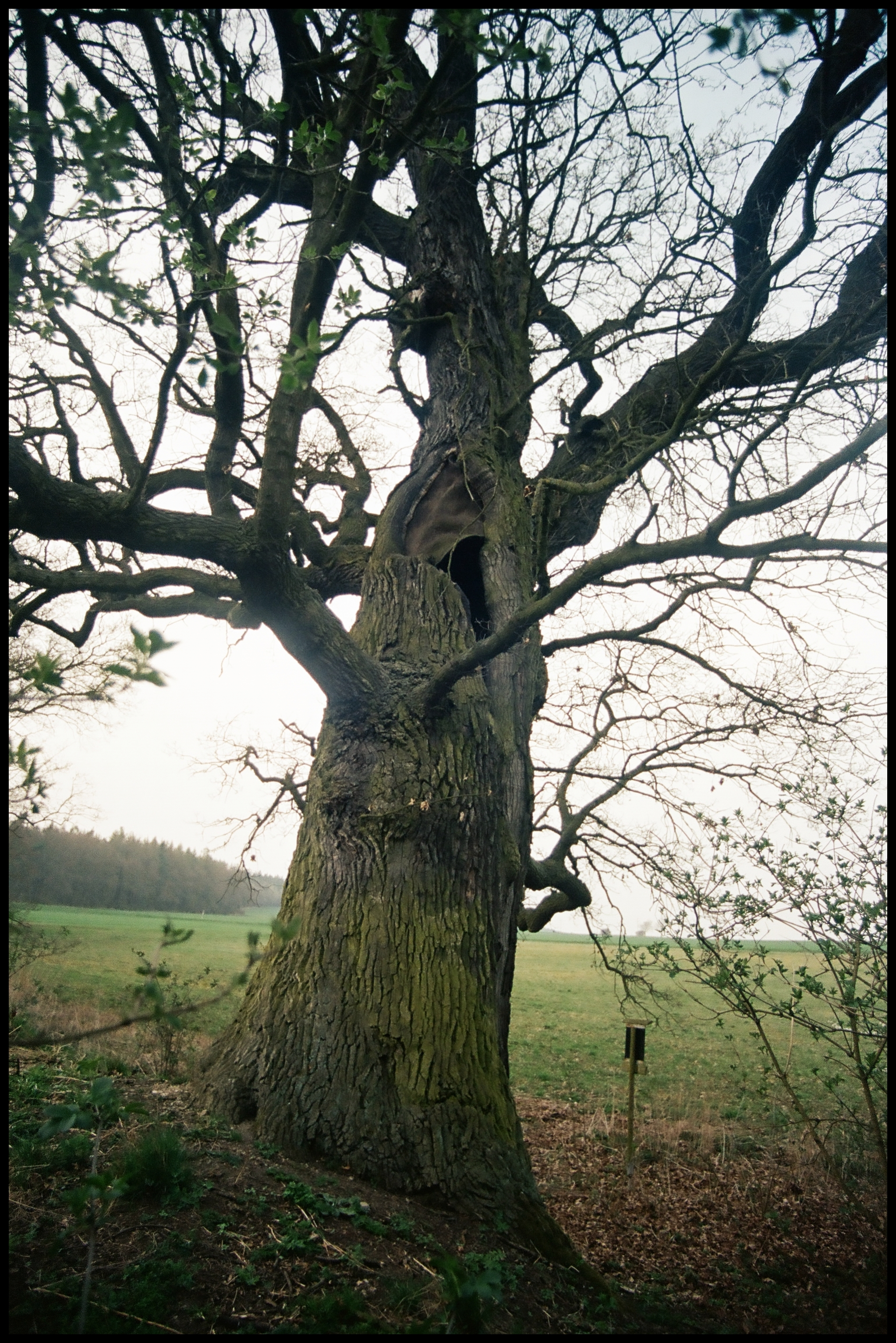 Dub mezi obcí Bohy a dvorem Rohy